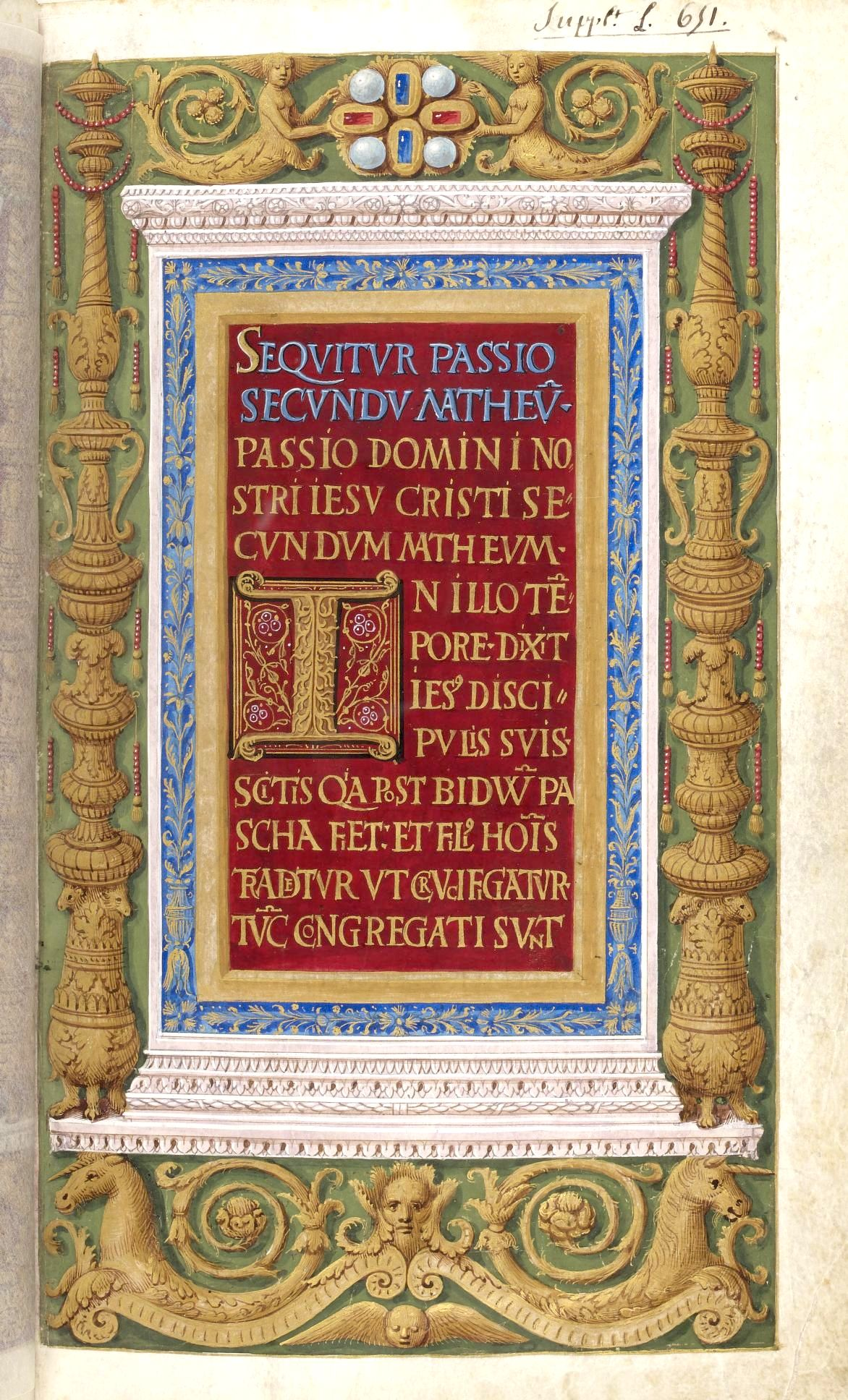 Aragon-f003-MathieuOpposé